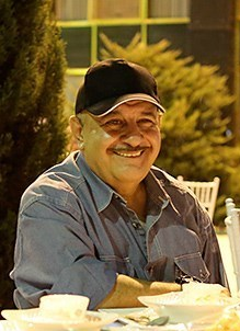 غلامحسین لطفی در ضیافت افطار هنرمندان پیشکسوت